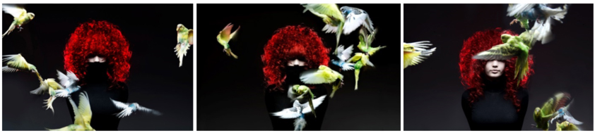 Birds of Fire, Print pe Durst Lambda suport Aluminiu, 2010, 100x70cm